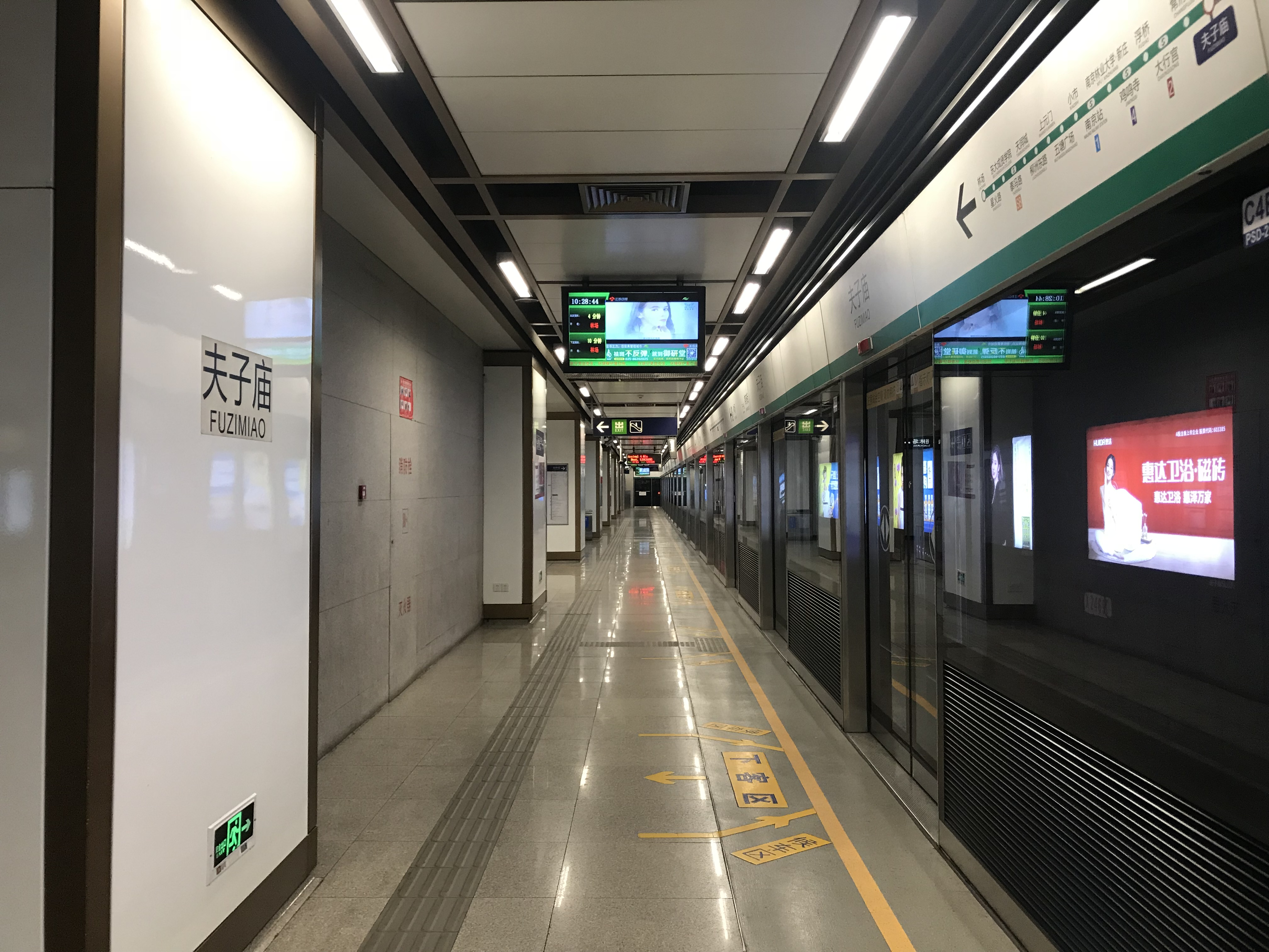 夫子廟駅のホーム